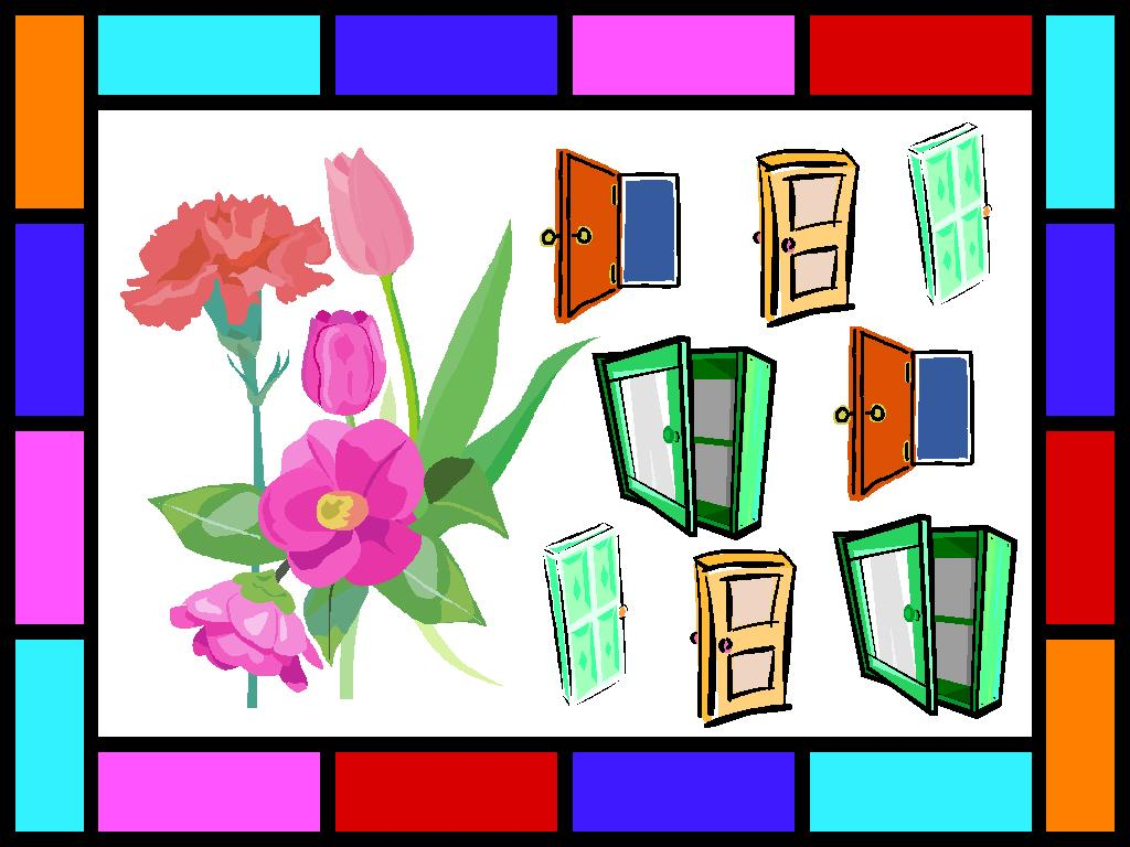 模擬臺灣超級電視台《黃金傳奇》內的提示，非由超級電視台工作人員提供